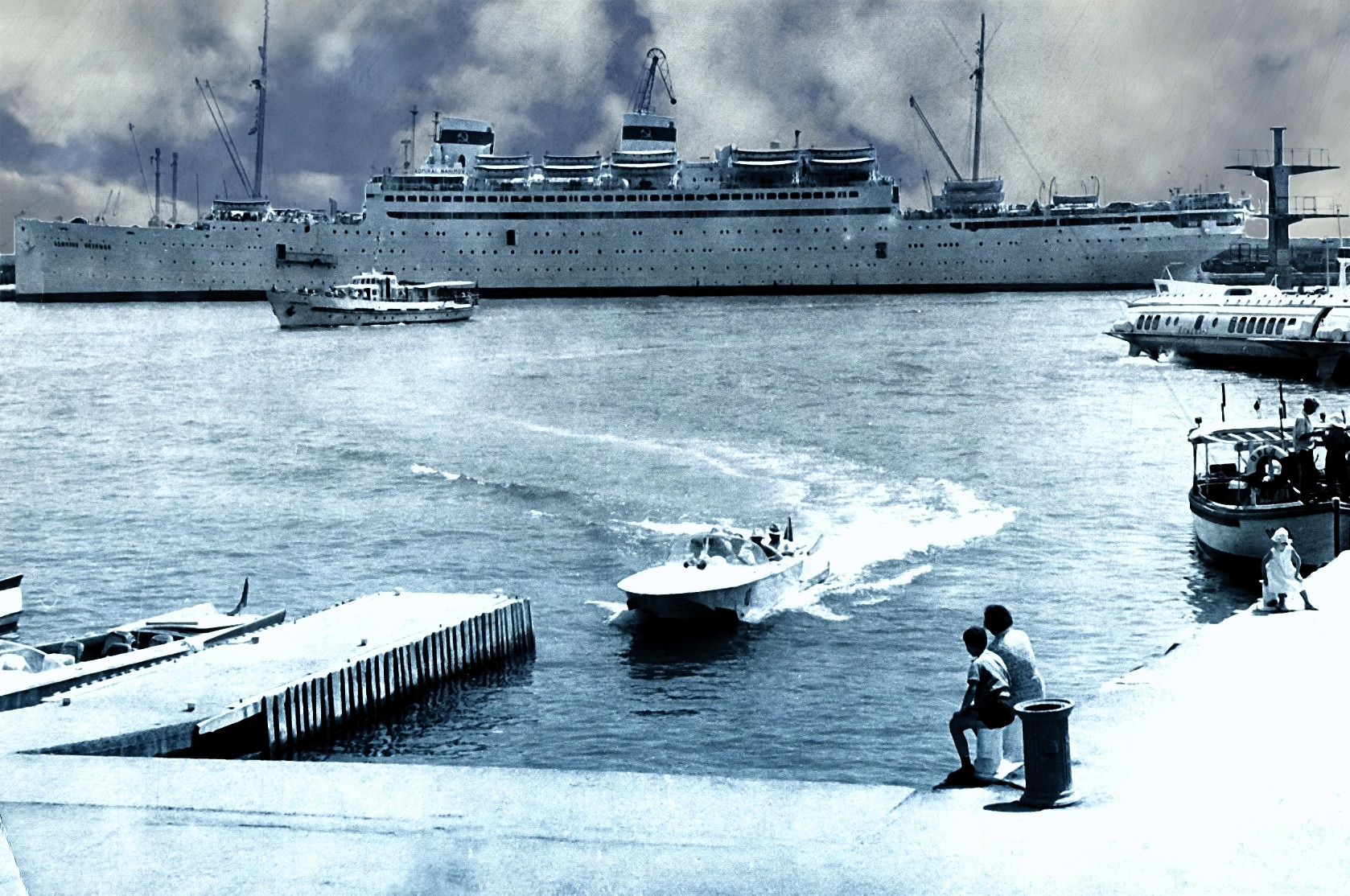 Admirál Nachimov v přístavu